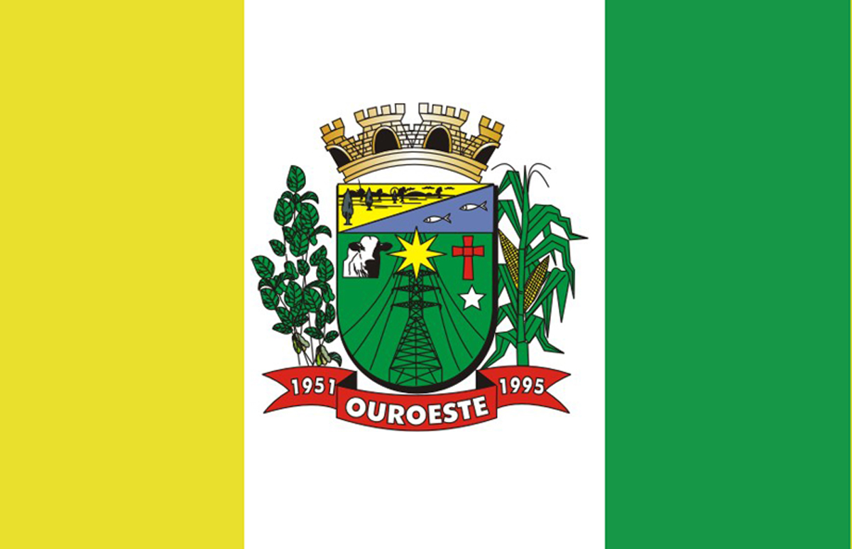 Bandeira do município de: Ouroeste, São Paulo, Brasil